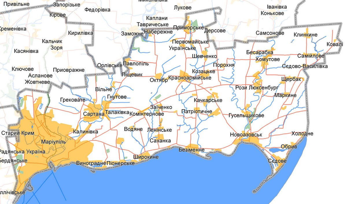 Map